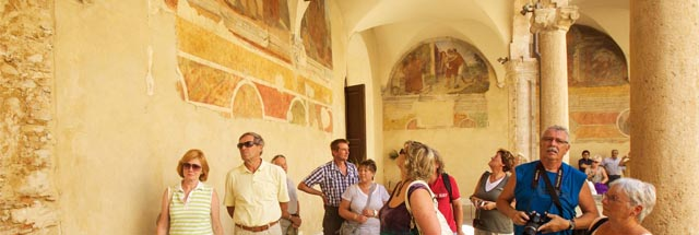 Esterno dell'archivio di stato nel centro storico di Cosenza.